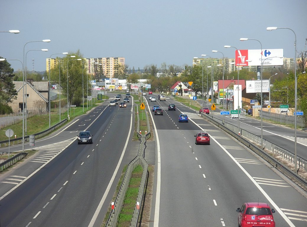 Aleja Jana Pawła II w Bydgoszczy - widok z węzła Lotnisko